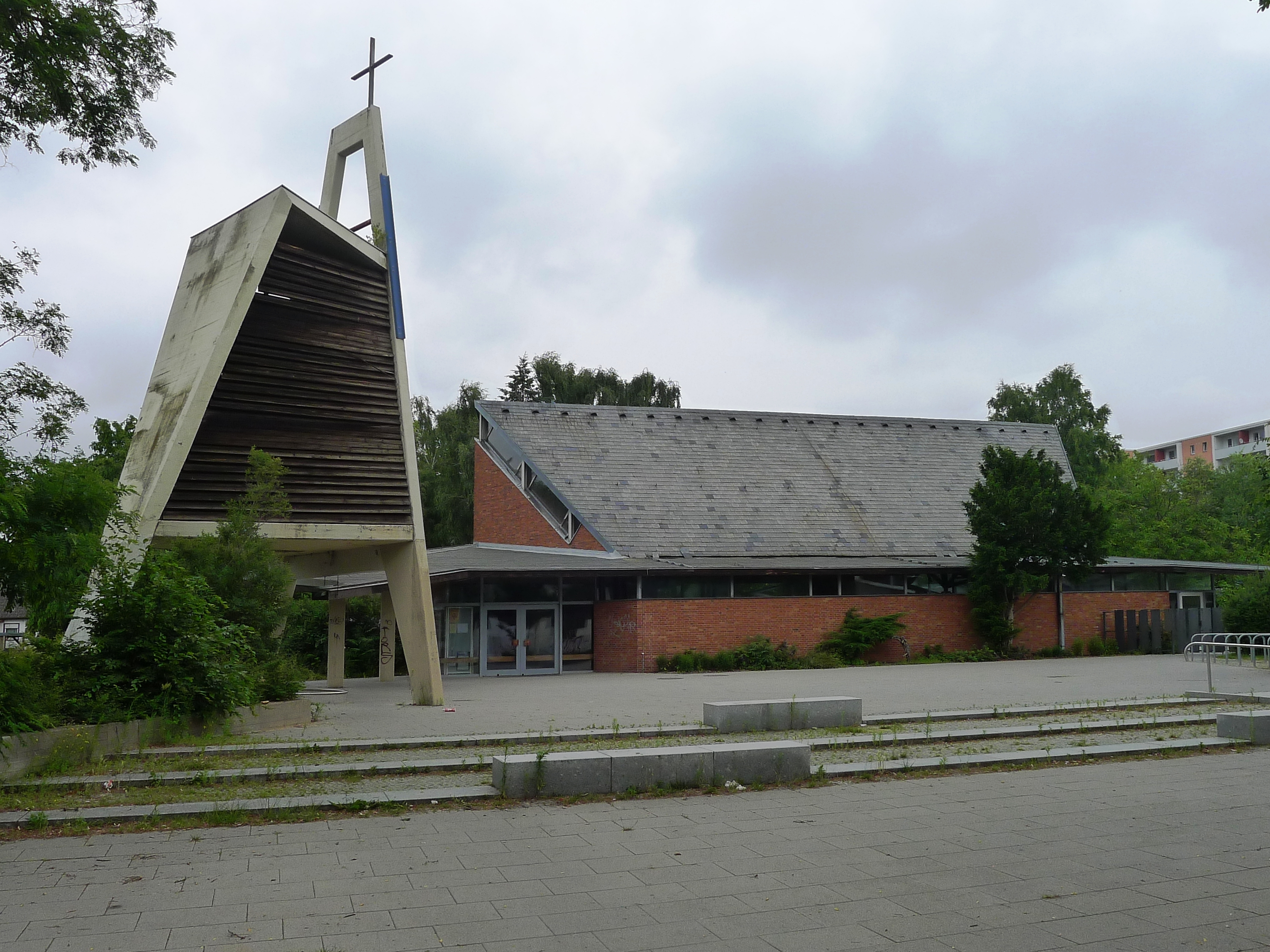 Blick auf die Kirche vom Henri-Dunant-Platz